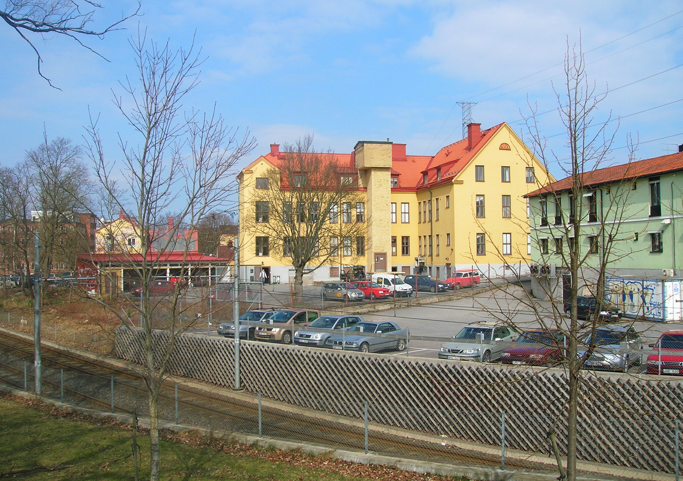 Builings on Bolidenvägen, Enskede gård. Built 1916